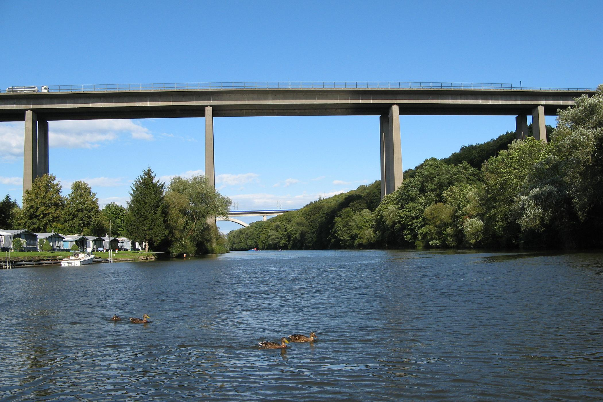 Lahntalbrücke Limburg BAB 3